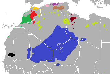 Lenguas bereberes